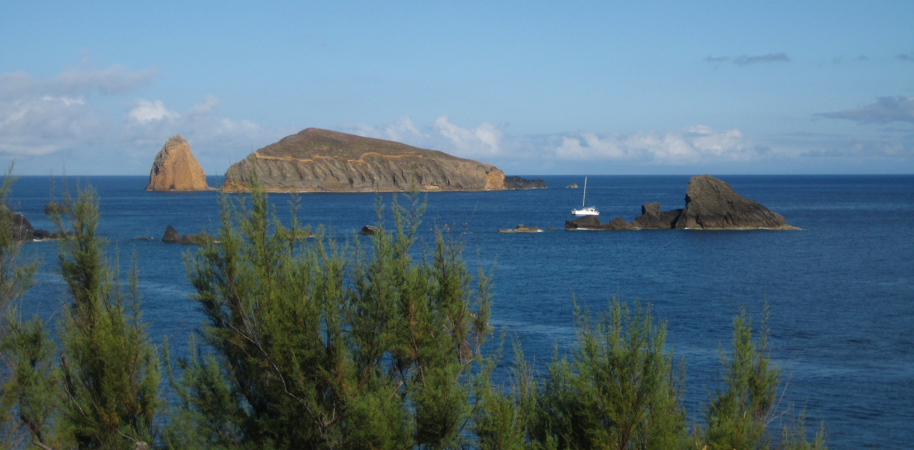 Idílica estampa en Carapacho